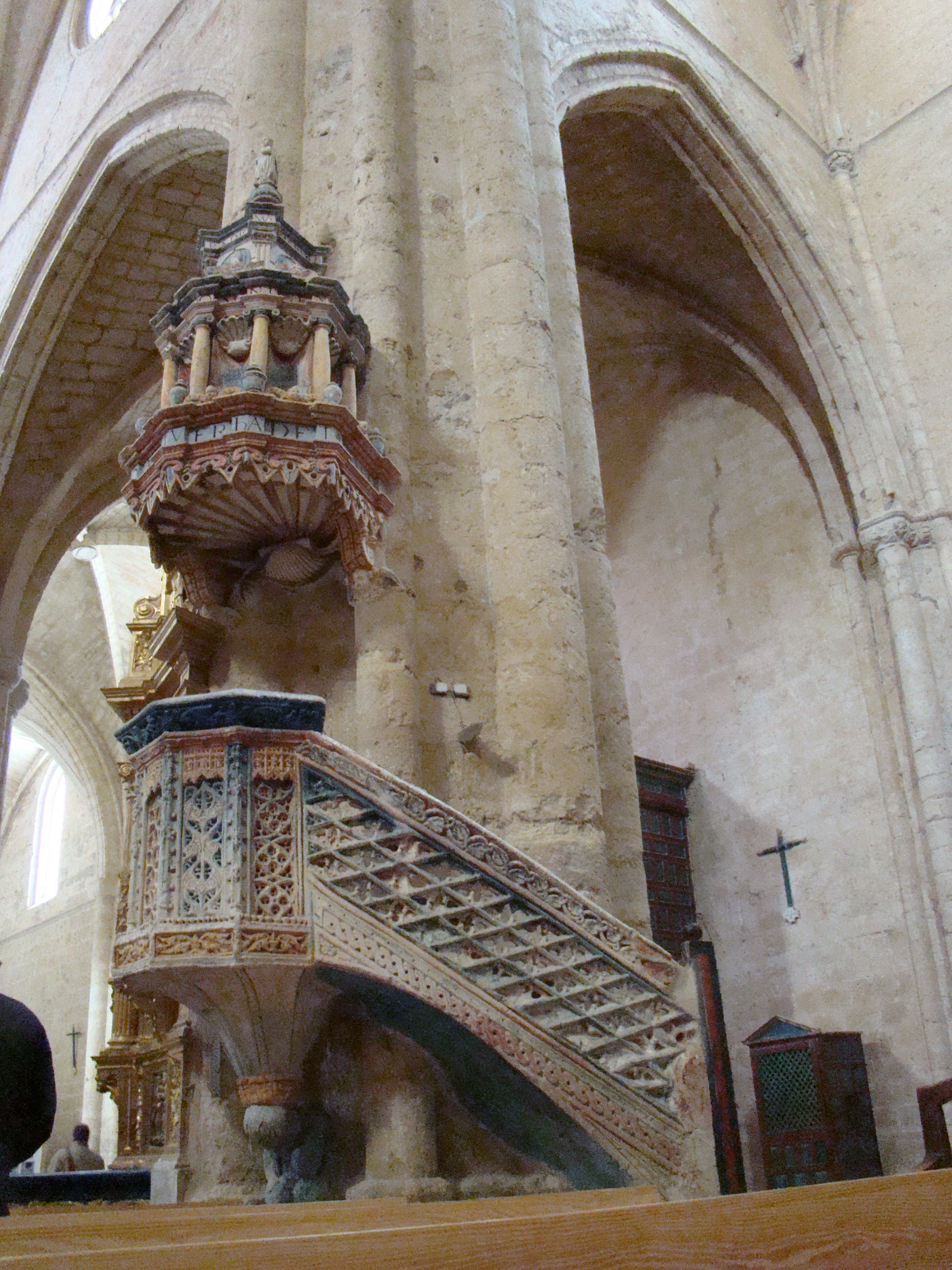 Iglesia de San Hipólito en Támara de Campos (Palencia, España). Púlpito de finales del siglo XV de yesería gótico-mudéjar. El tornavoz es de principios del XVI de estilo renacentista.